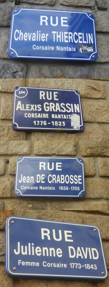 Placas de calles dedicadas a corsarios en la ciudad francesa de Nantes.